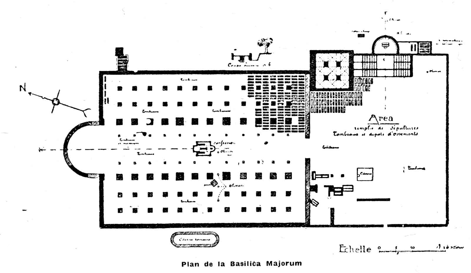 Plan de la basilica majorum _ Carthage